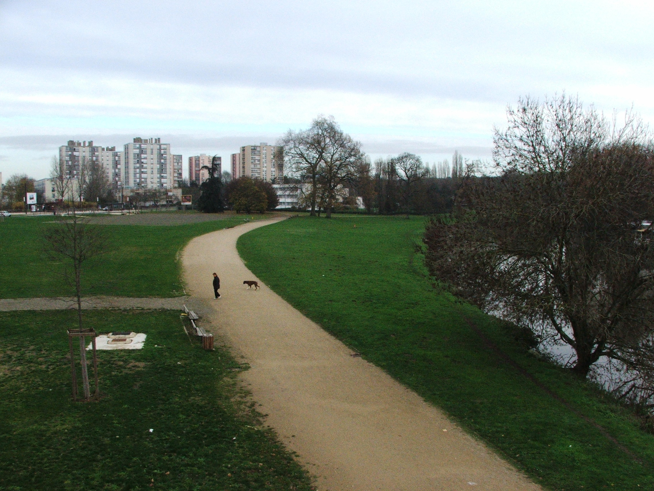 Les bords de l'Huisne au niveau des Sablons.